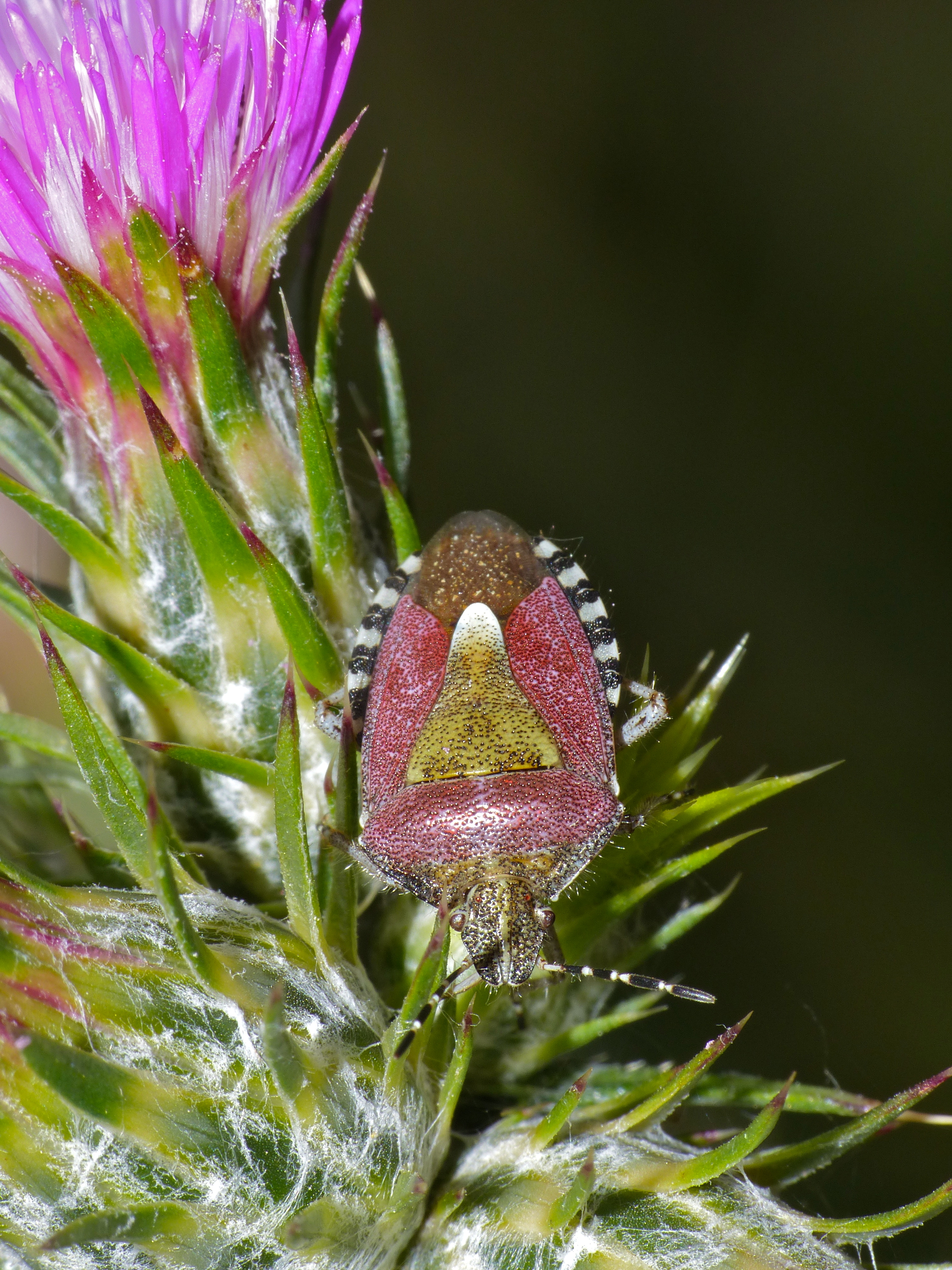 CA-891 Road South of Campollo, La Vega de Liébana, Cantabria, SPAIN